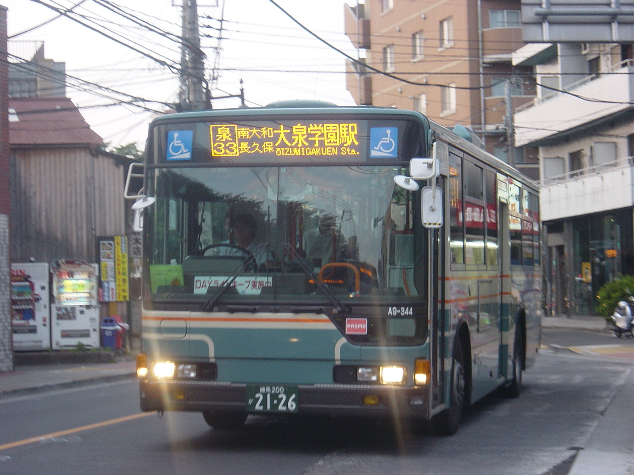 西武バスが導入した三菱ふそうOEM車PKG-AP35UM型車。上石神井営業所がA9-344号車として導入した。吉祥寺線向けとして2＆1のシート配置とした。